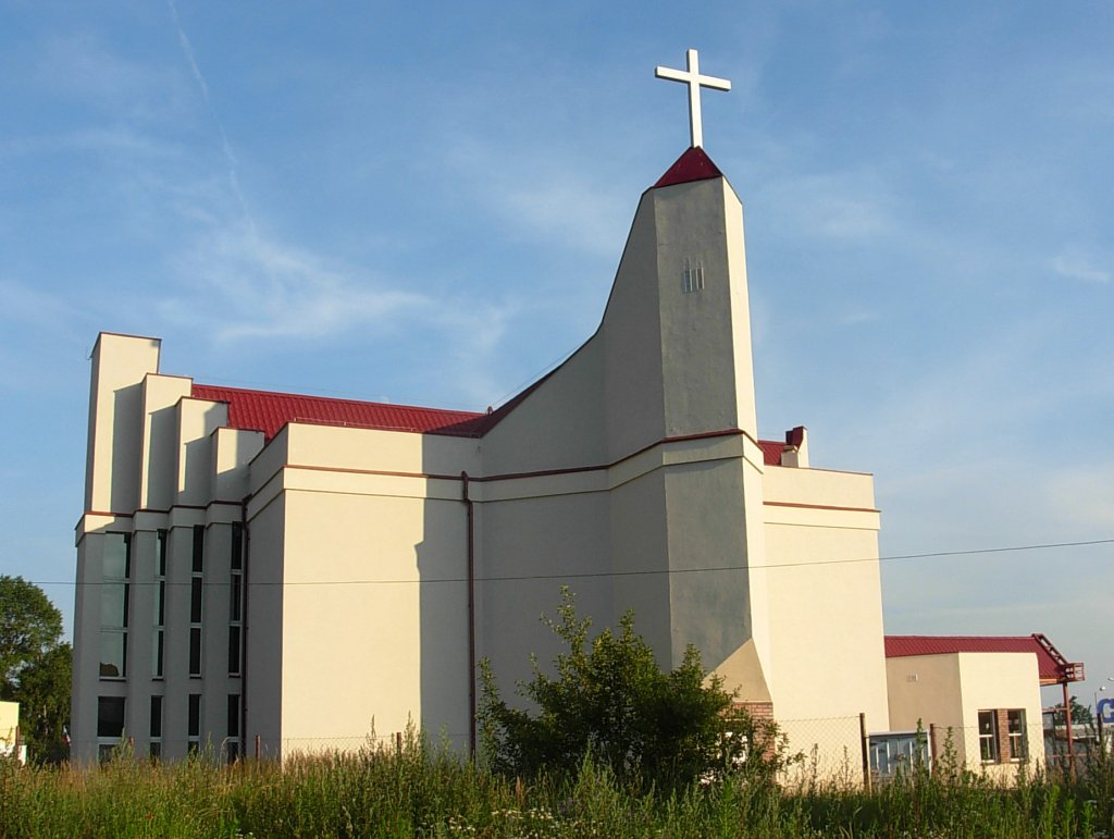 Kościół zielonoświątkowy w Bydgoszczy